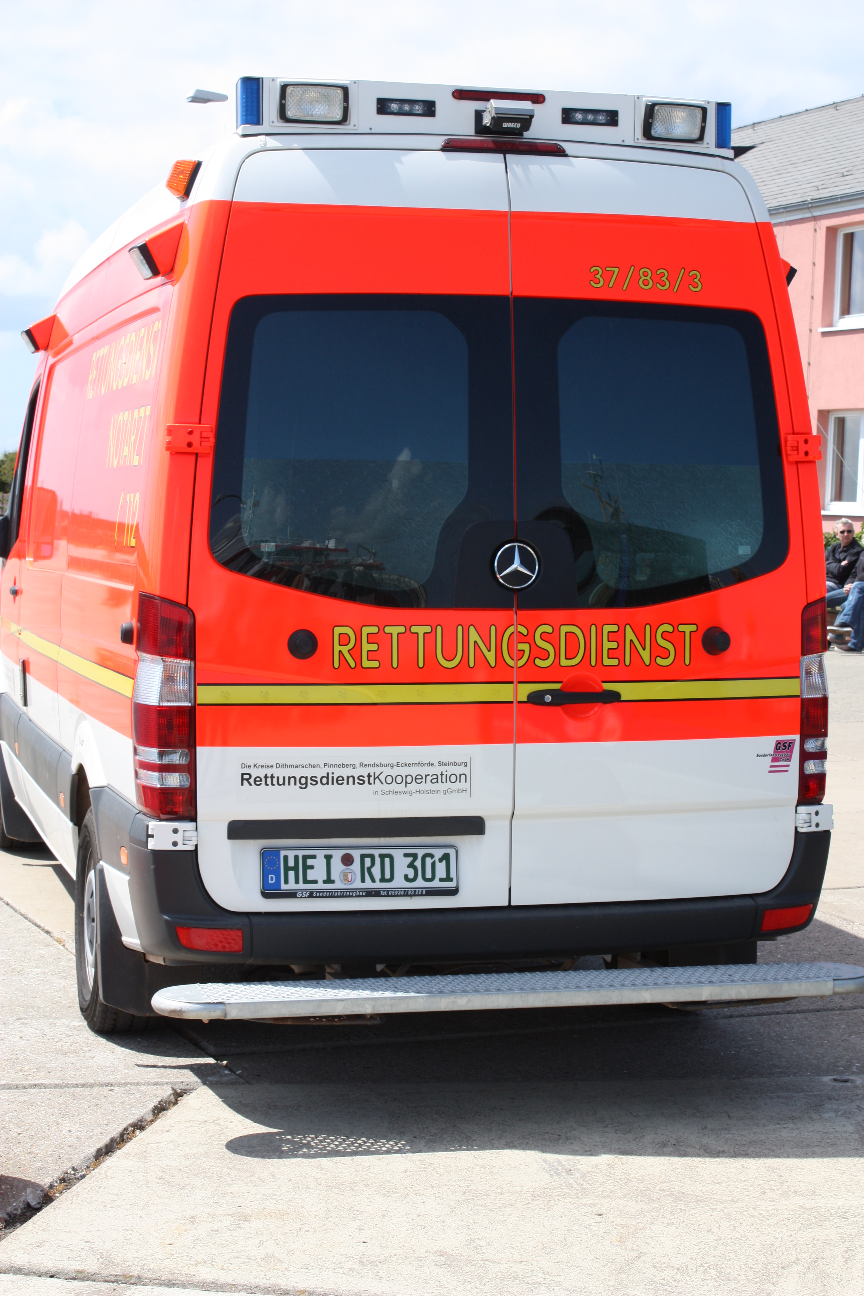 Heligoland harbour, hafen Helgoland